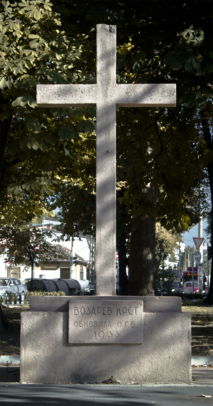 Vozarev krst.